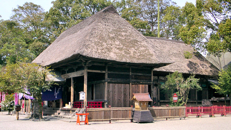 青井阿蘇神社 拝殿（左）と幣殿（右）